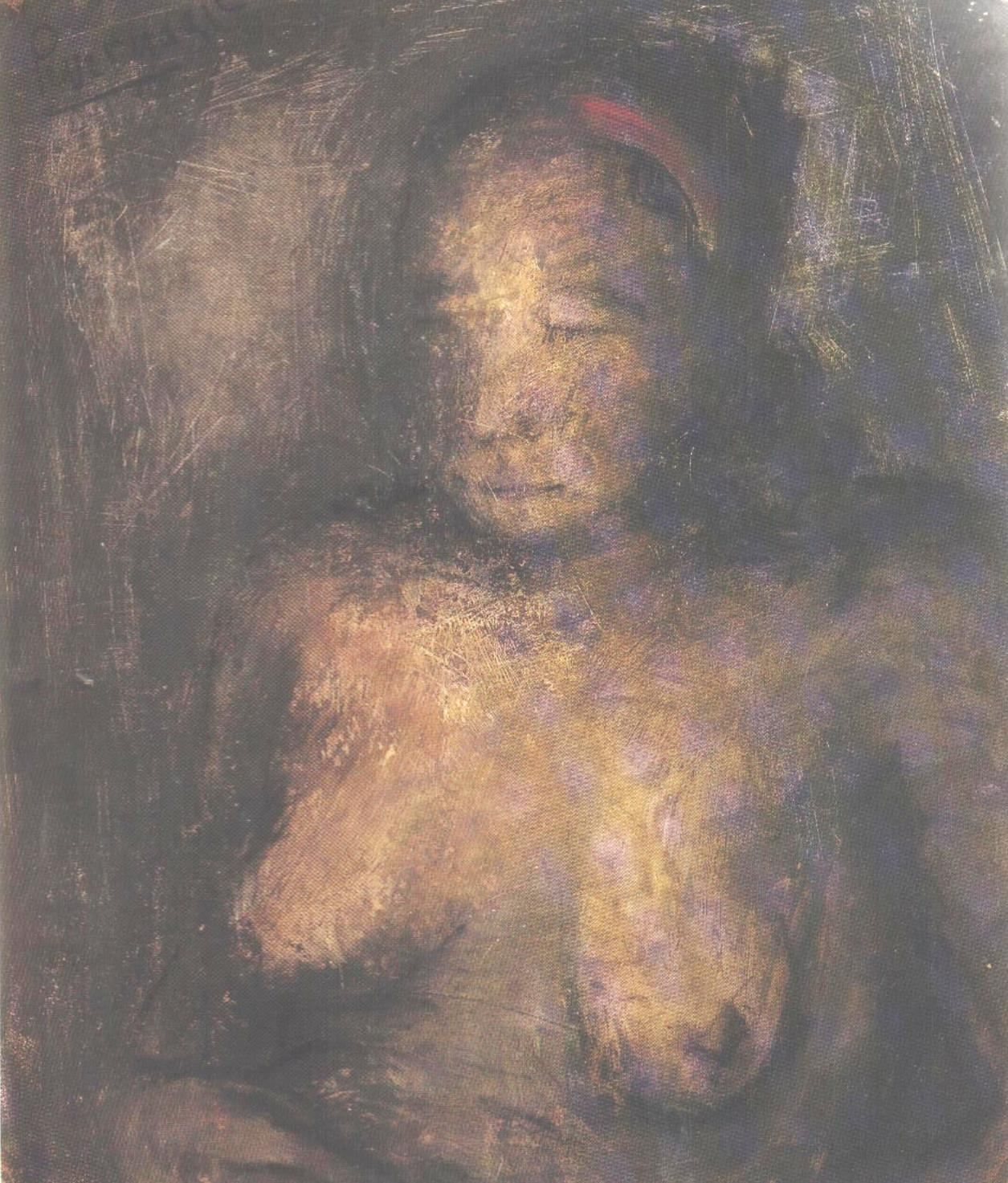 Gemengde media